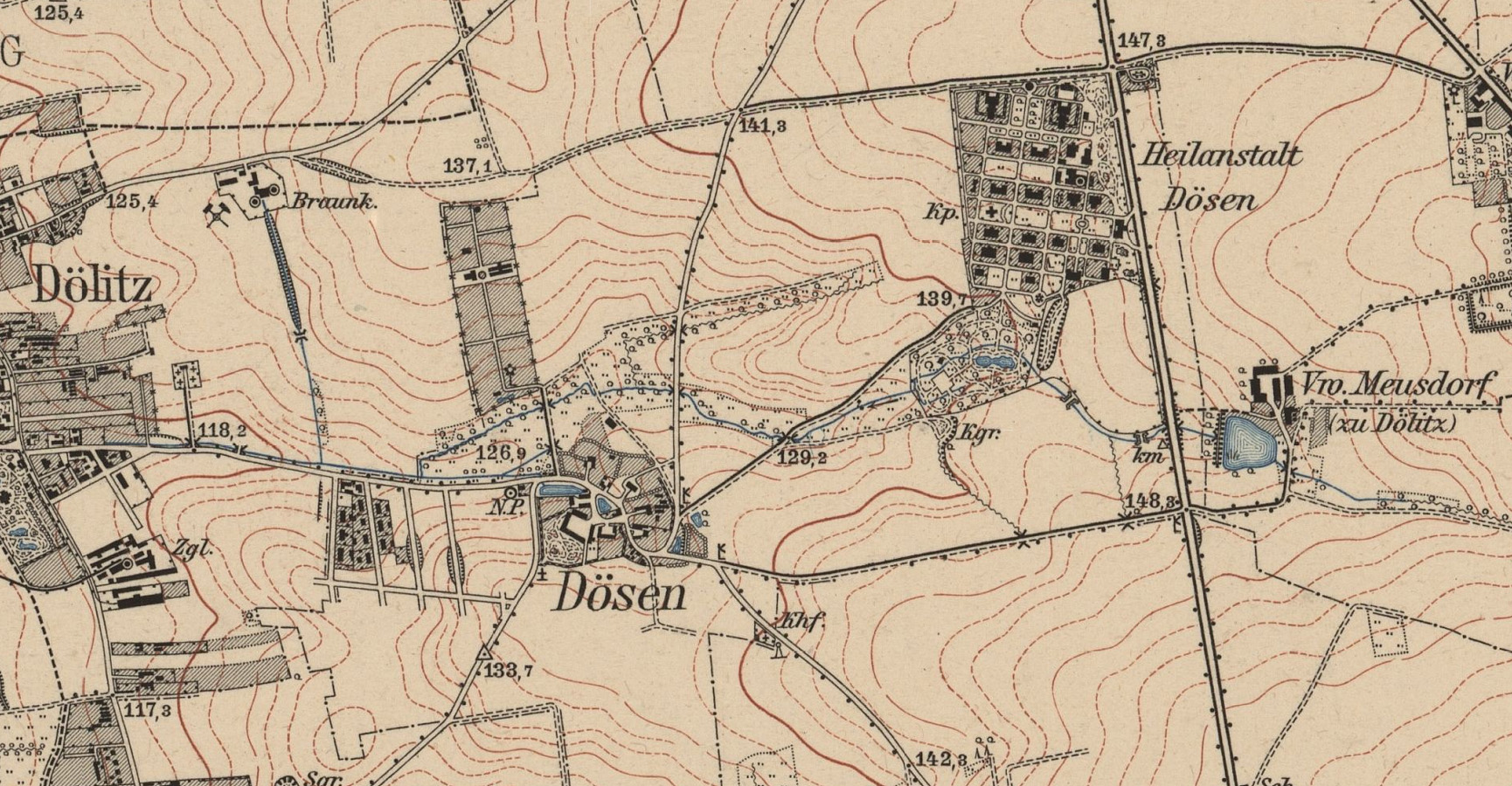 Dösen bei Leipzig auf einer Karte von 1907